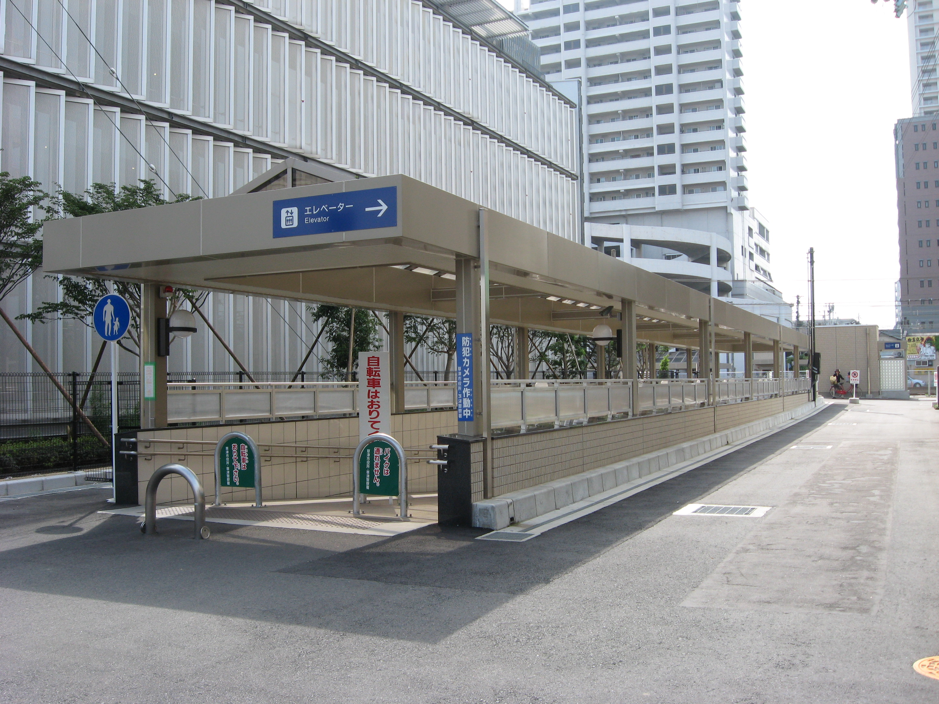 JR Kusatsu Station Underpass